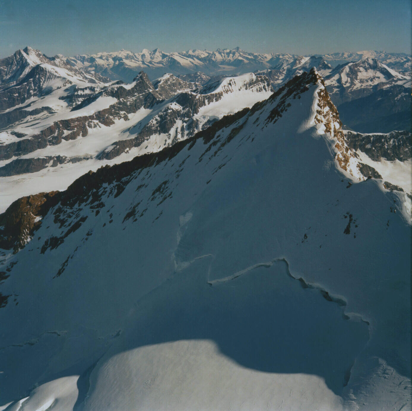 Gipfelaufbau des Nordend im Monte-Rosa-Massiv 1978, Wallis, Schweiz/Italien